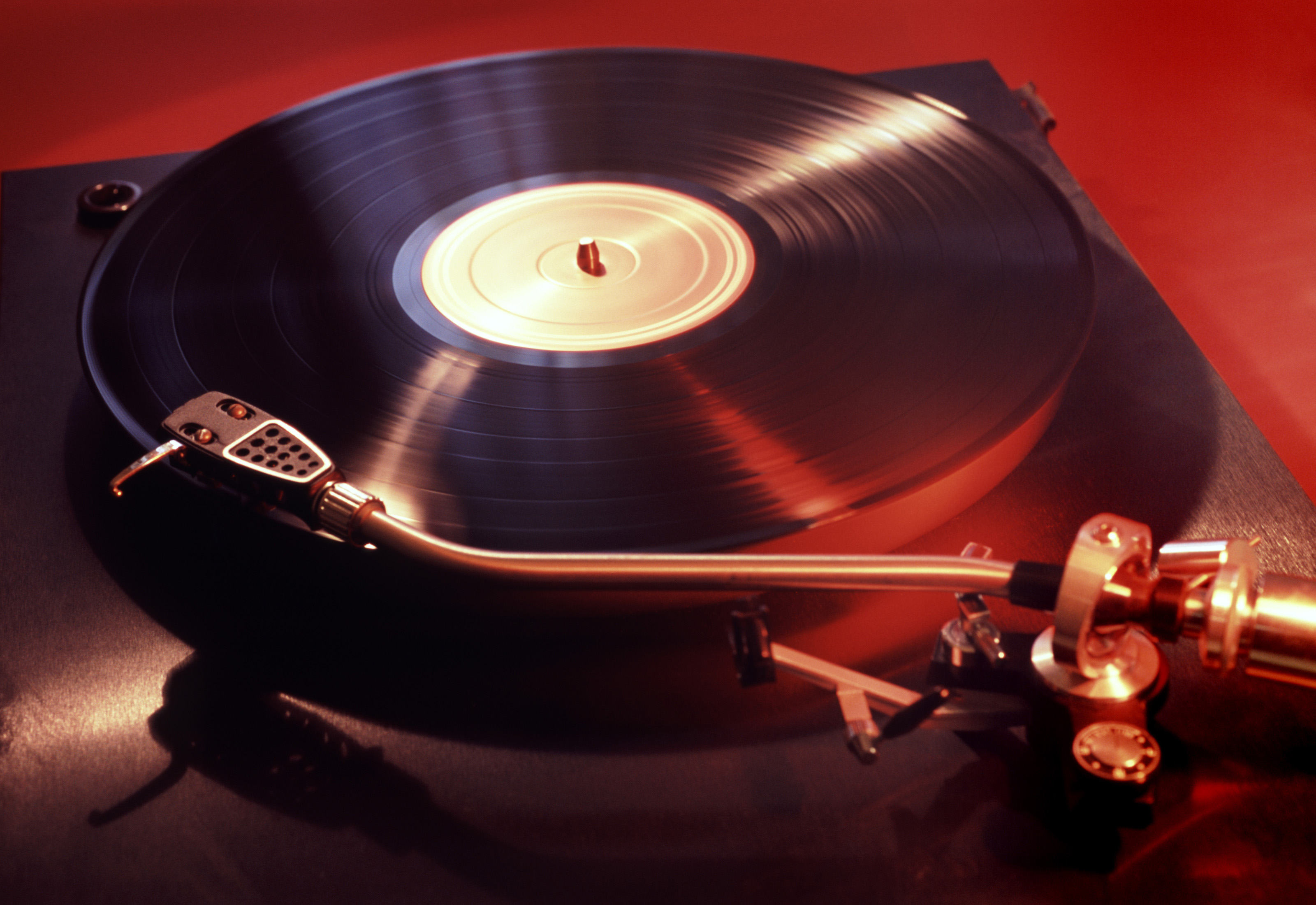 Ini adalah bentuk Vinyl Player yang biasanya dilihat banyak orang